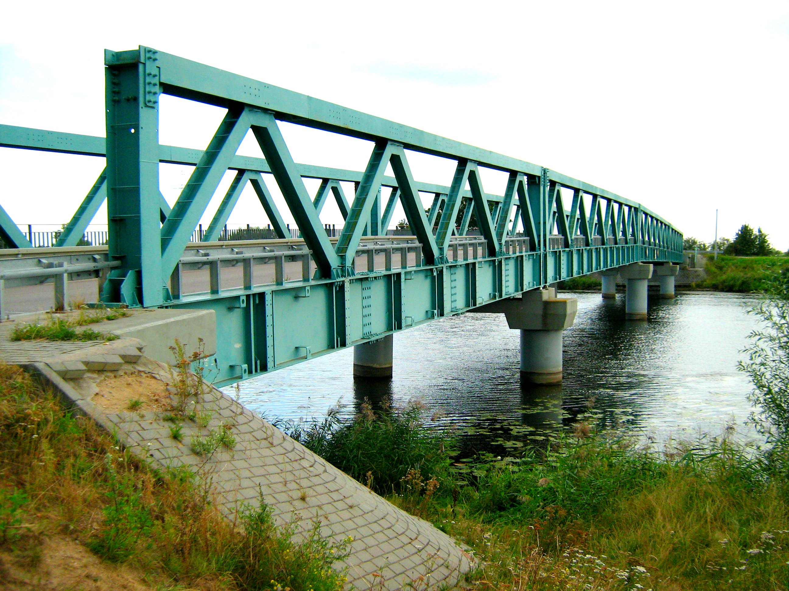 Most przez Nogat w Kępkach